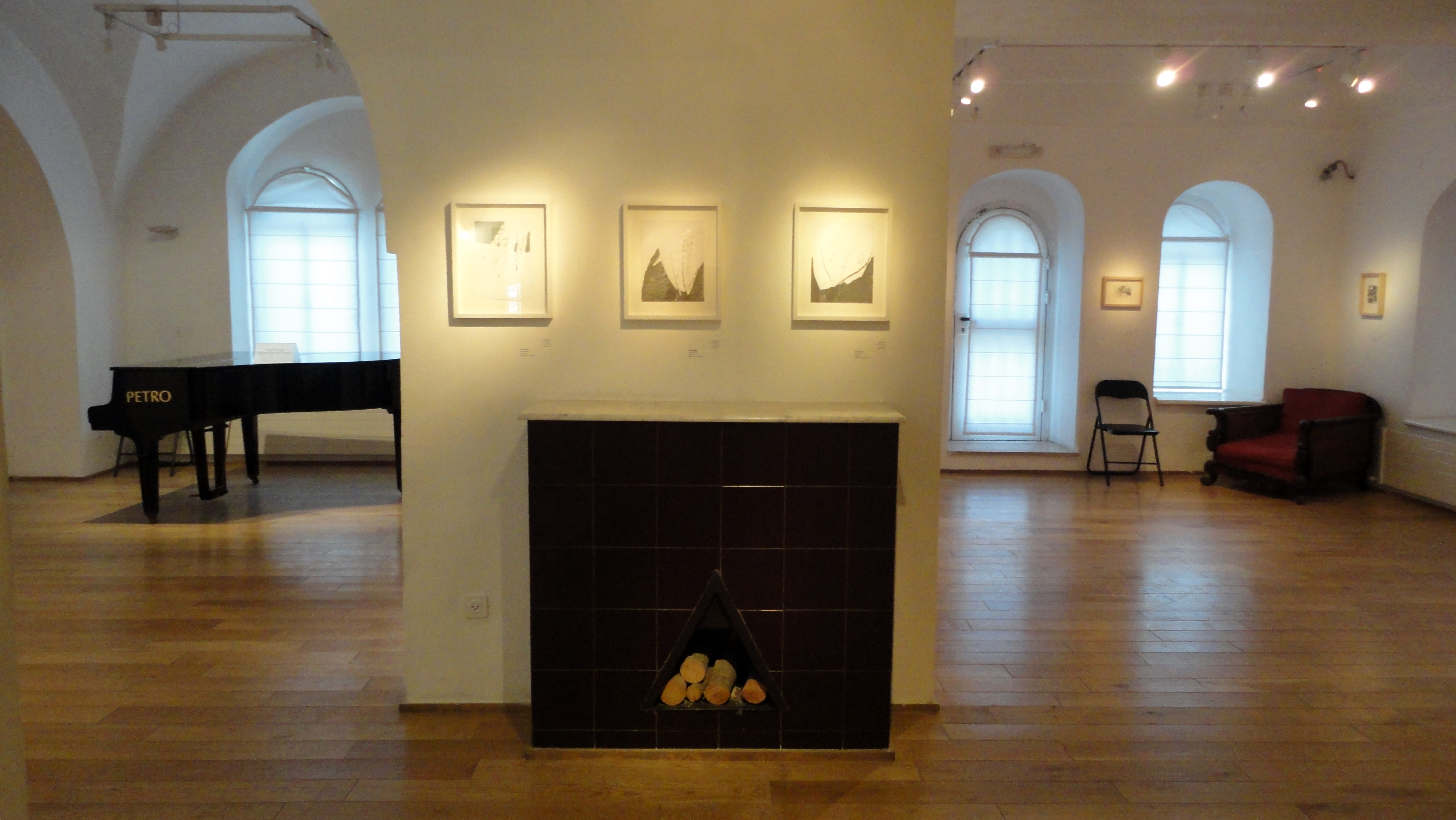 בית טיכו הוא אחד הבתים הראשונים בירושלים שנבנו מחוץ לחומות העיר העתיקה. הבית שימש למגוריהם ועבודתם של האומנית אנה טיכו ובעלה הרופא החוקר אברהם אלברט טיכו. כיום המקום משמש כמוזיאון המנציח את פועלם.